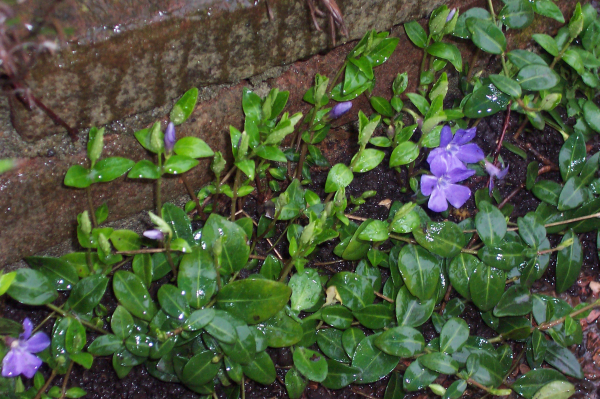 Frisselgrien (kleine maagdenpalm)